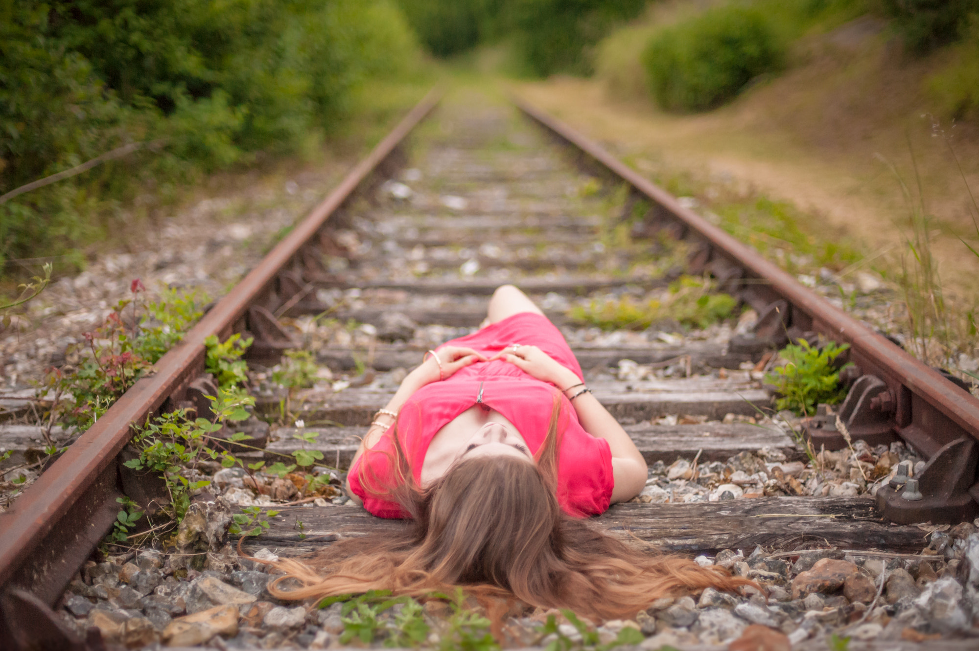 500px provided description: Model : Am?lie [#red ,#girl ,#dress ,#rail]